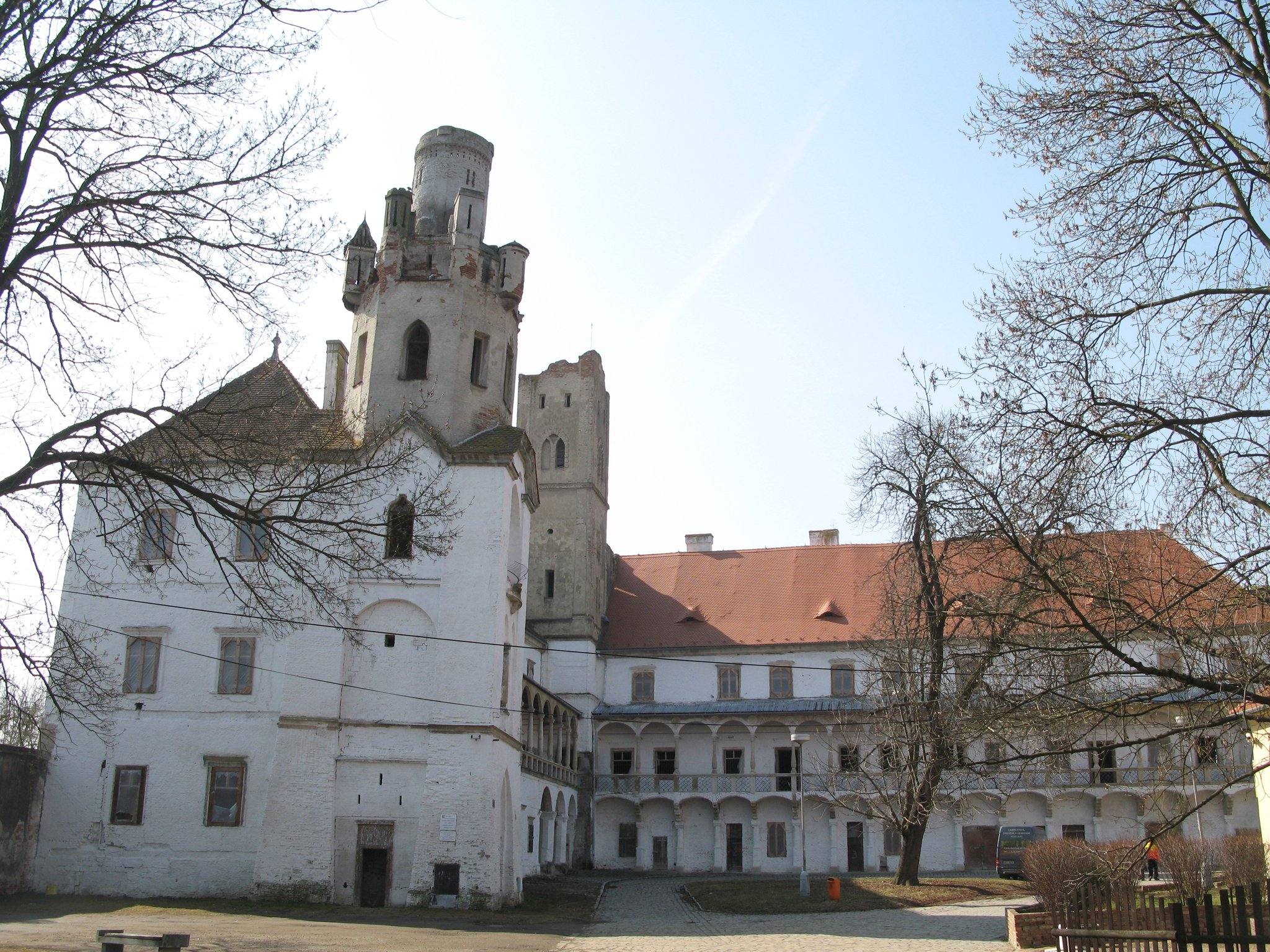 Zámek Břeclav, nám. Zámecké 1/2, Břeclav